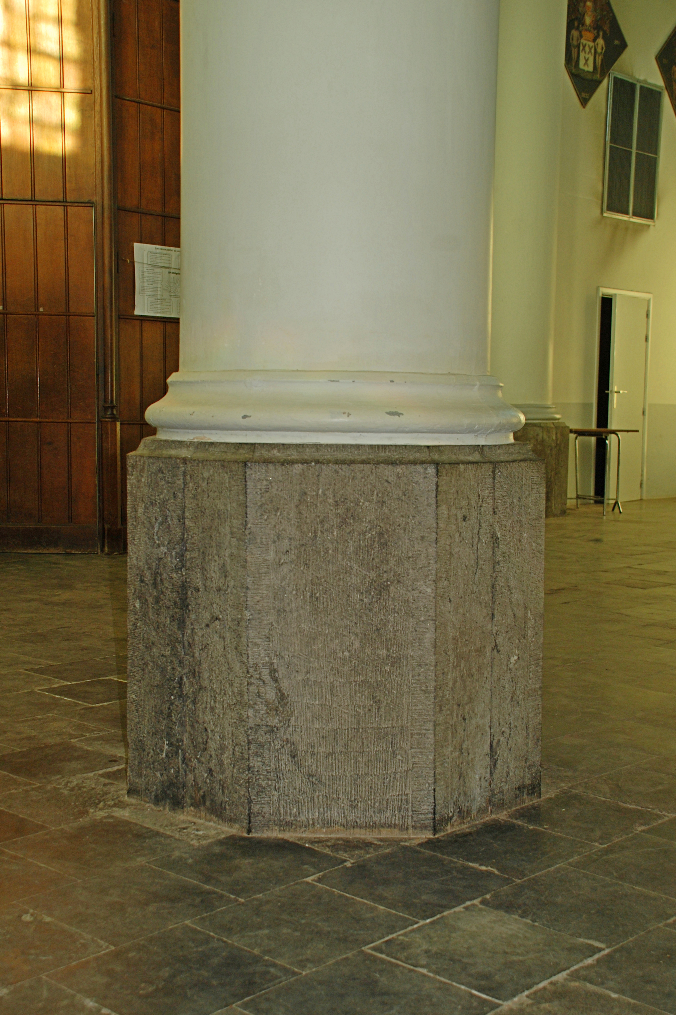 Belgique - Brabant wallon - Ottignies-Louvain-la-Neuve - Céroux - église Notre-Dame de Bon Secours (néo-gothique, Antoine Moreau, 1848)